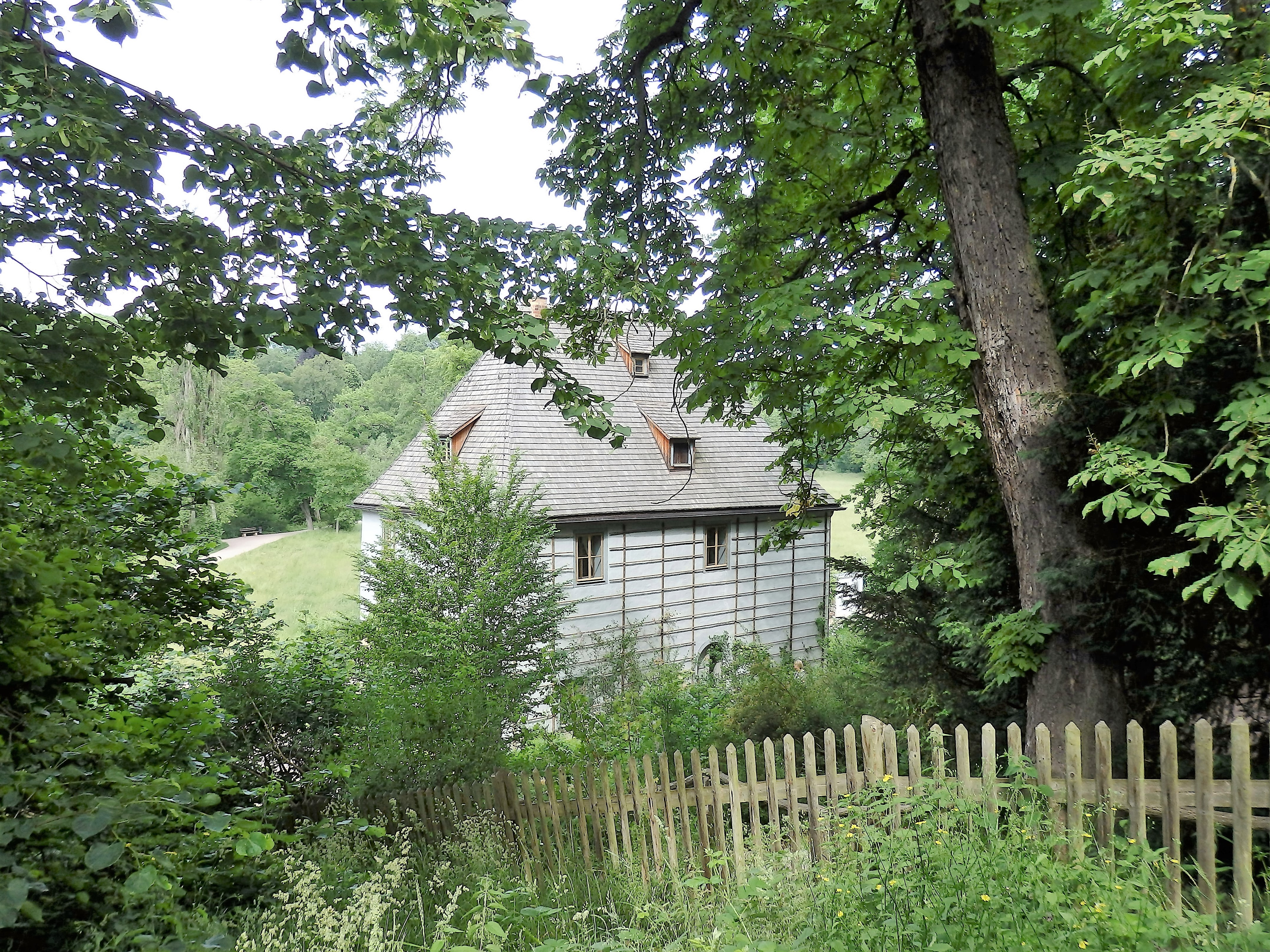 Goetehs Gartenhaus vom Hang aus, von Osten, gesehen